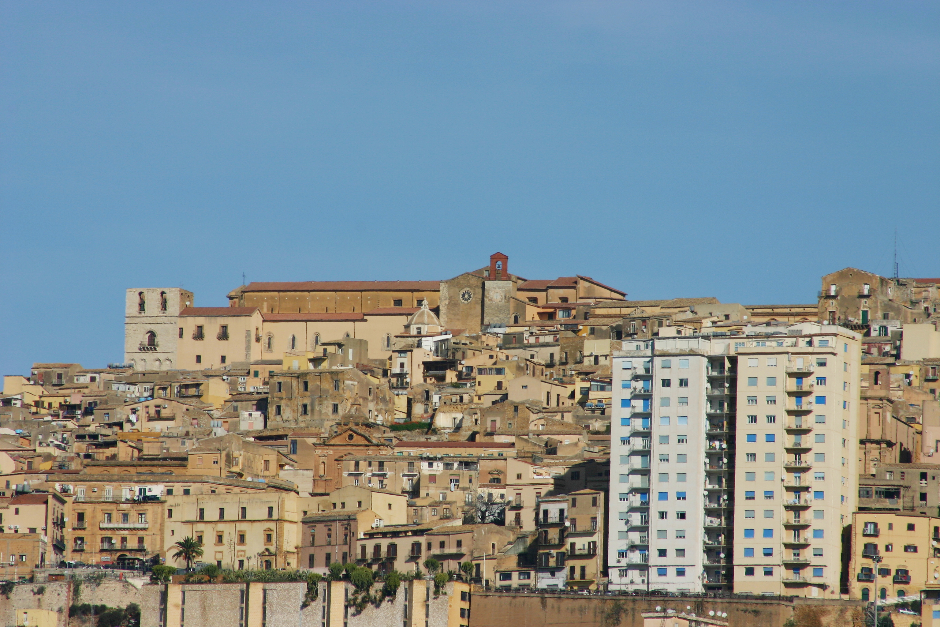 Views of Agrigento